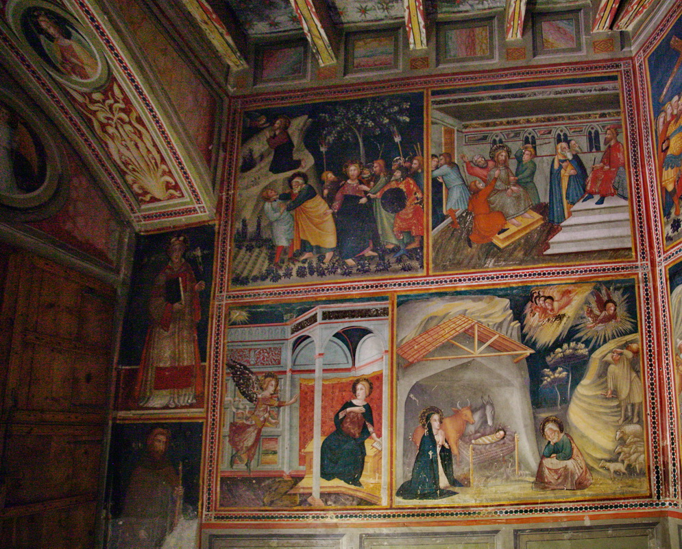 Conjunt d'imatges de la paret esquerra de la cel·la.